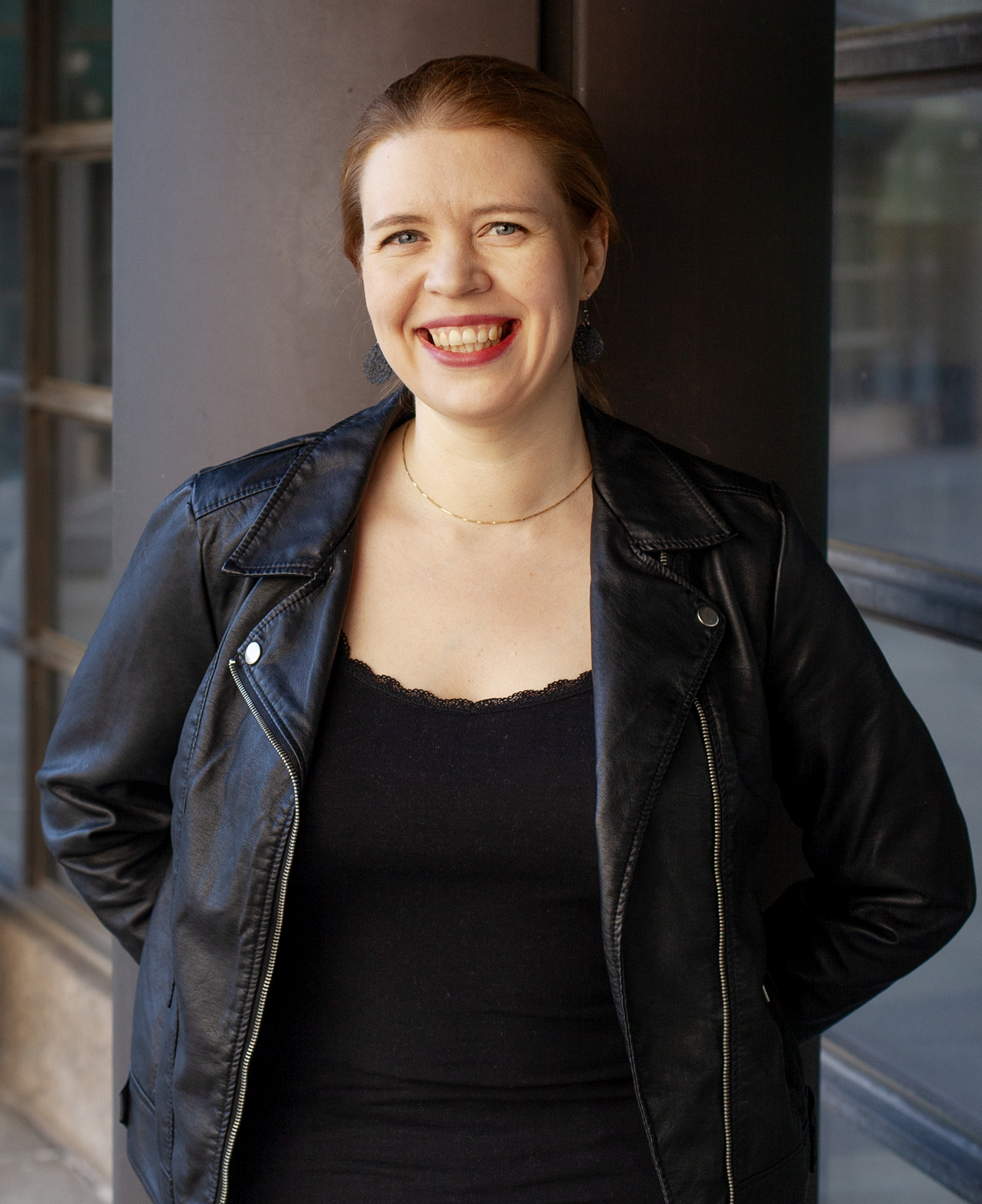 Anna Kontula, eduskunta